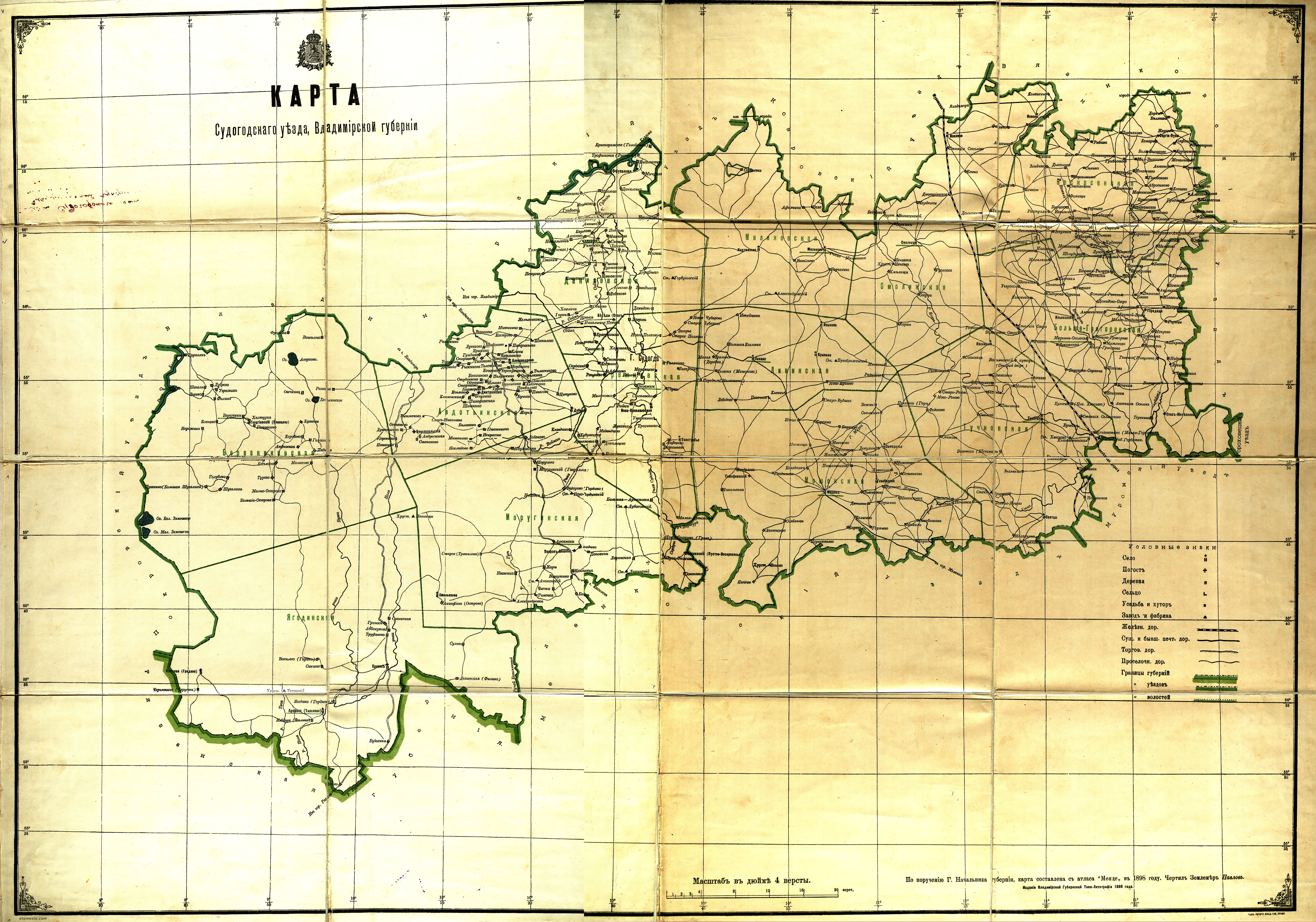 Карта Судогодского уезда Владимирской губернии